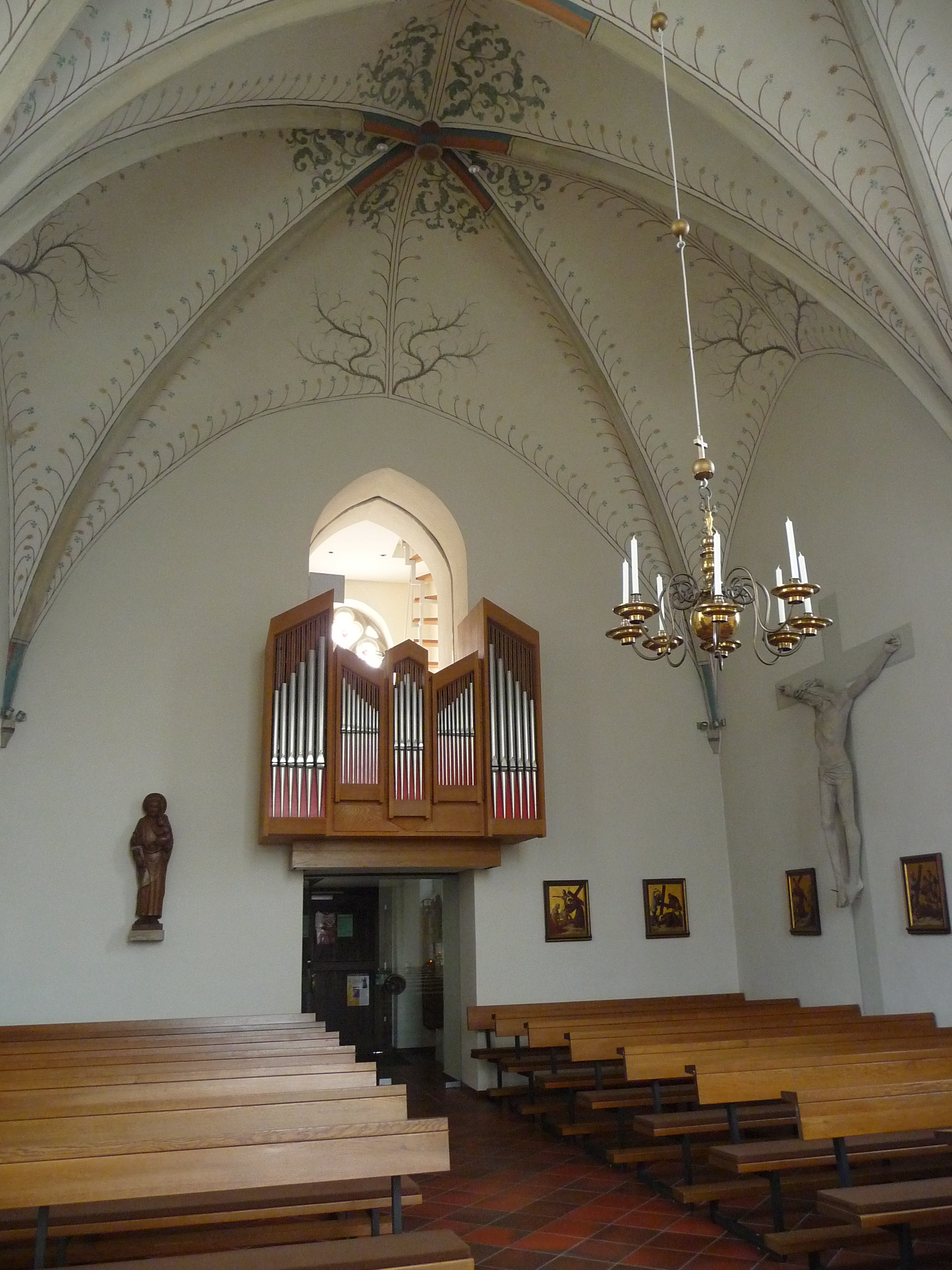 Katholische Kirche und Autobahnkapelle St. Antonius in Gescher (Nordrhein-Westfalen, Deutschland)